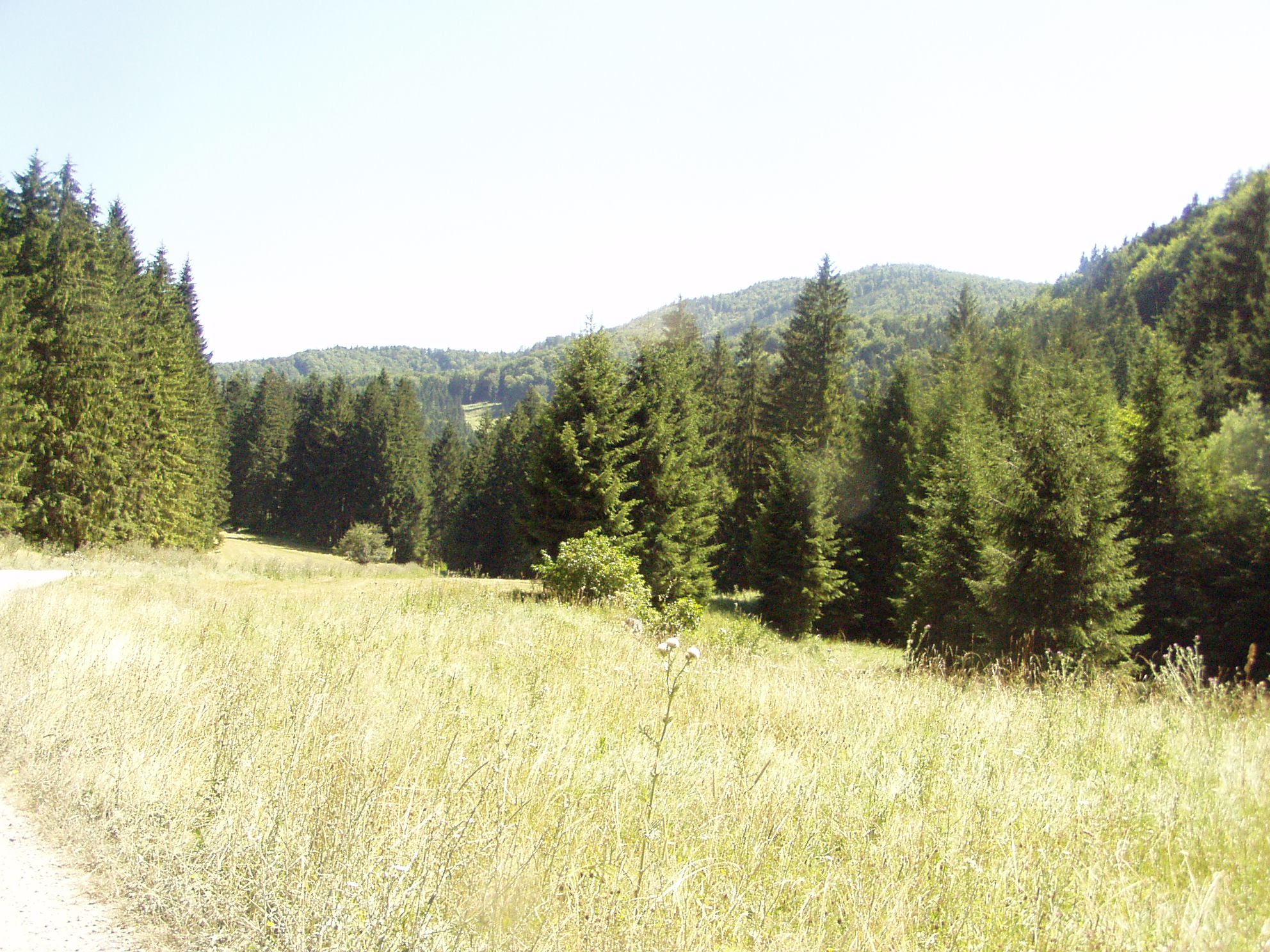 Stredná časť doliny